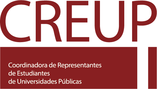 Logo de la Coordinadora de Representantes de Estudiantes de Universidades Públicas (CREUP)